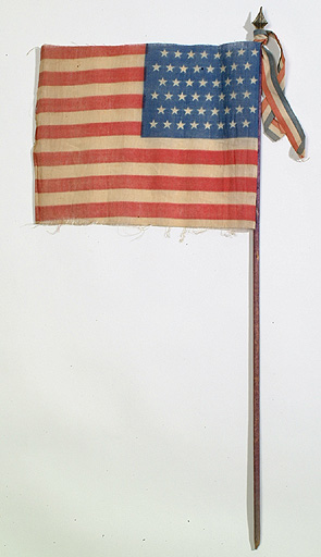 Distribué aux Rennais lors de la libération de Rennes en Août 1944.